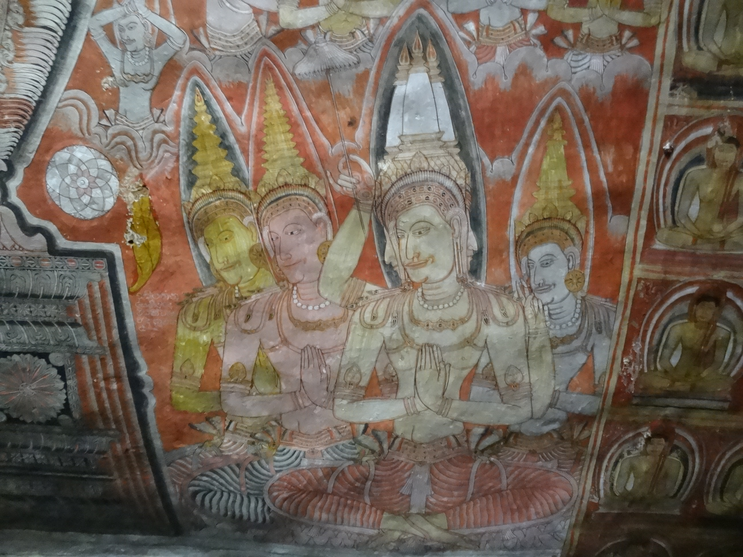 Dambulla cave temple